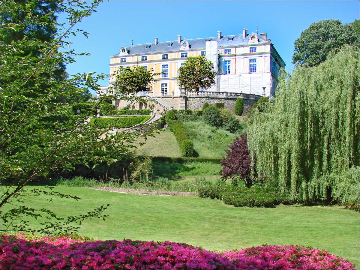 Le Château Colbert est aujourd'hui un hôtel restaurant, le jardin oriental faisait partie à l'origine du domaine du château Conçu par Alexandre MARCEL (1860-1928), entre 1899 et 1910, un célèbre architecte français spécialisé dans les styles asiatiques, le parc oriental a été acheté et remis en état par la commune de Maulévrier. Il est géré par une association. Le parc est reconnu comme le plus grand parc d’inspiration japonaise en Europe (période Edo) Alexandre Marcel a notamment conçu le pavillon du Cambodge de l'exposition universelle de 1900 voir une autre réalisation de l'architecte en Egypte Site du parc oriental